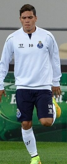 Хуан Кінтеро під час виступів за Порту